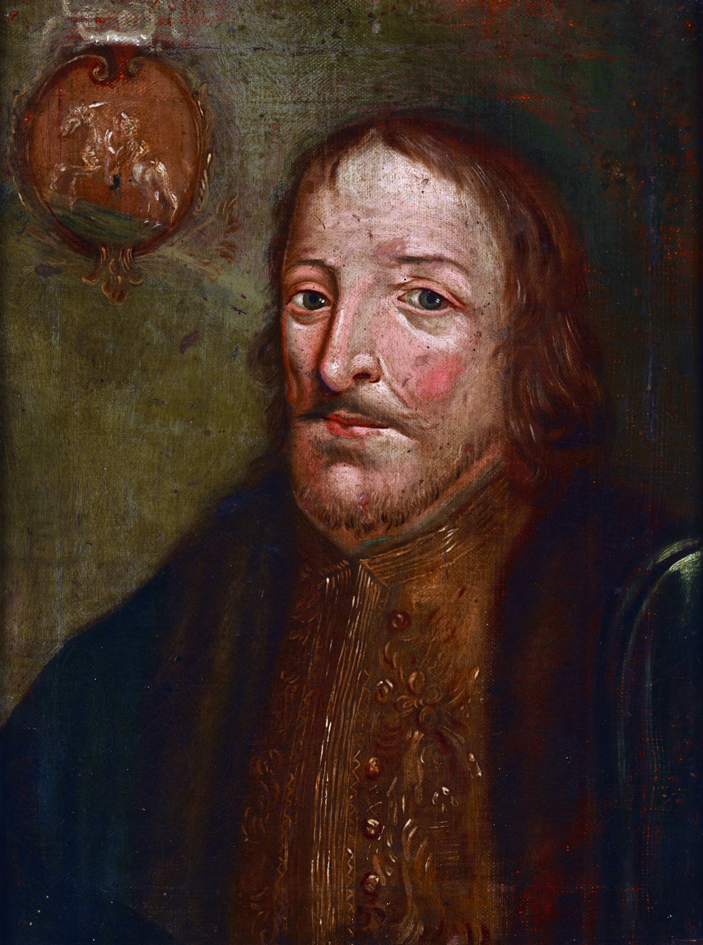 Беларуская (тарашкевіца): Партрэт Канстантына Астроскага (Kanstantyn Astroski)